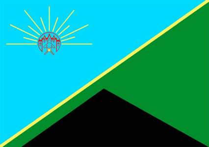 Прапор м. Красноармійськ